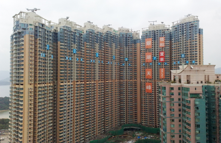 HK Lake Silver 銀湖·天峰